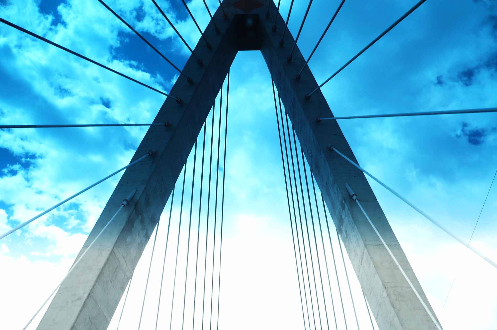 El primer pilar del viaducto Cesar Gaviria (vía Armenia - Manizales) visto desde el vehículo. El filtro azul es del vidrio panorámico del carro. Puente/Bridge: Viaducto César Gaviria Trujillo Lugar/Place: Pereira, Colombia